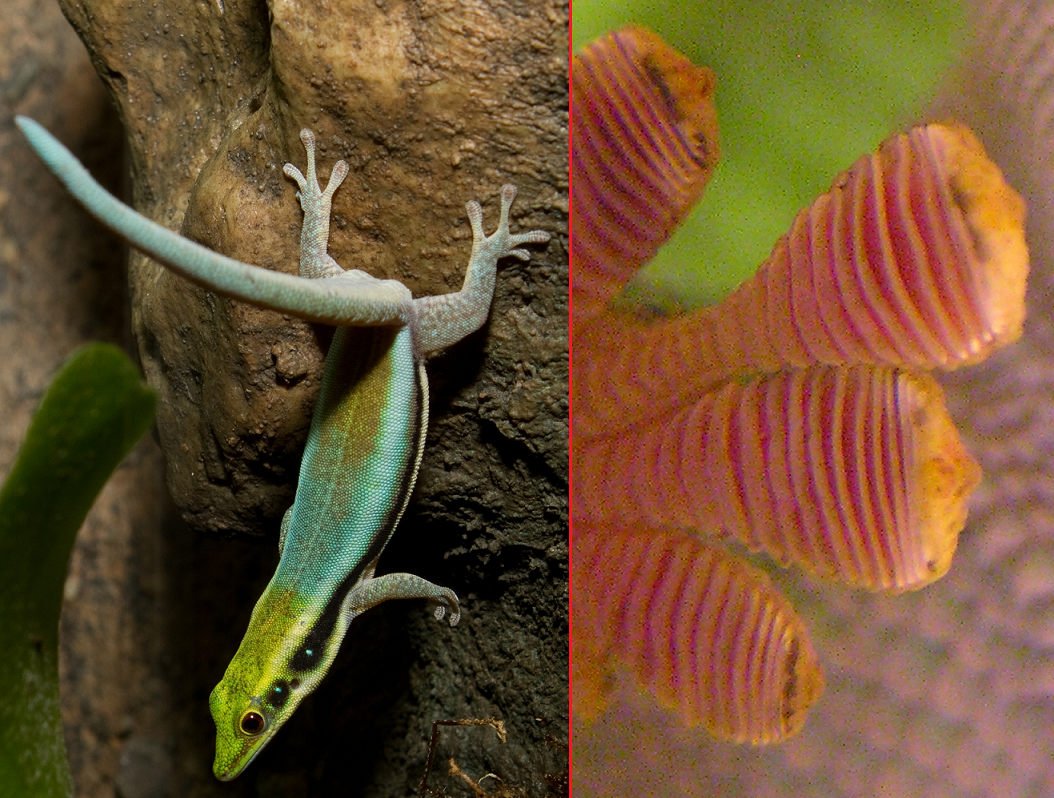 Tenen en houding van twee Phelsuma soorten